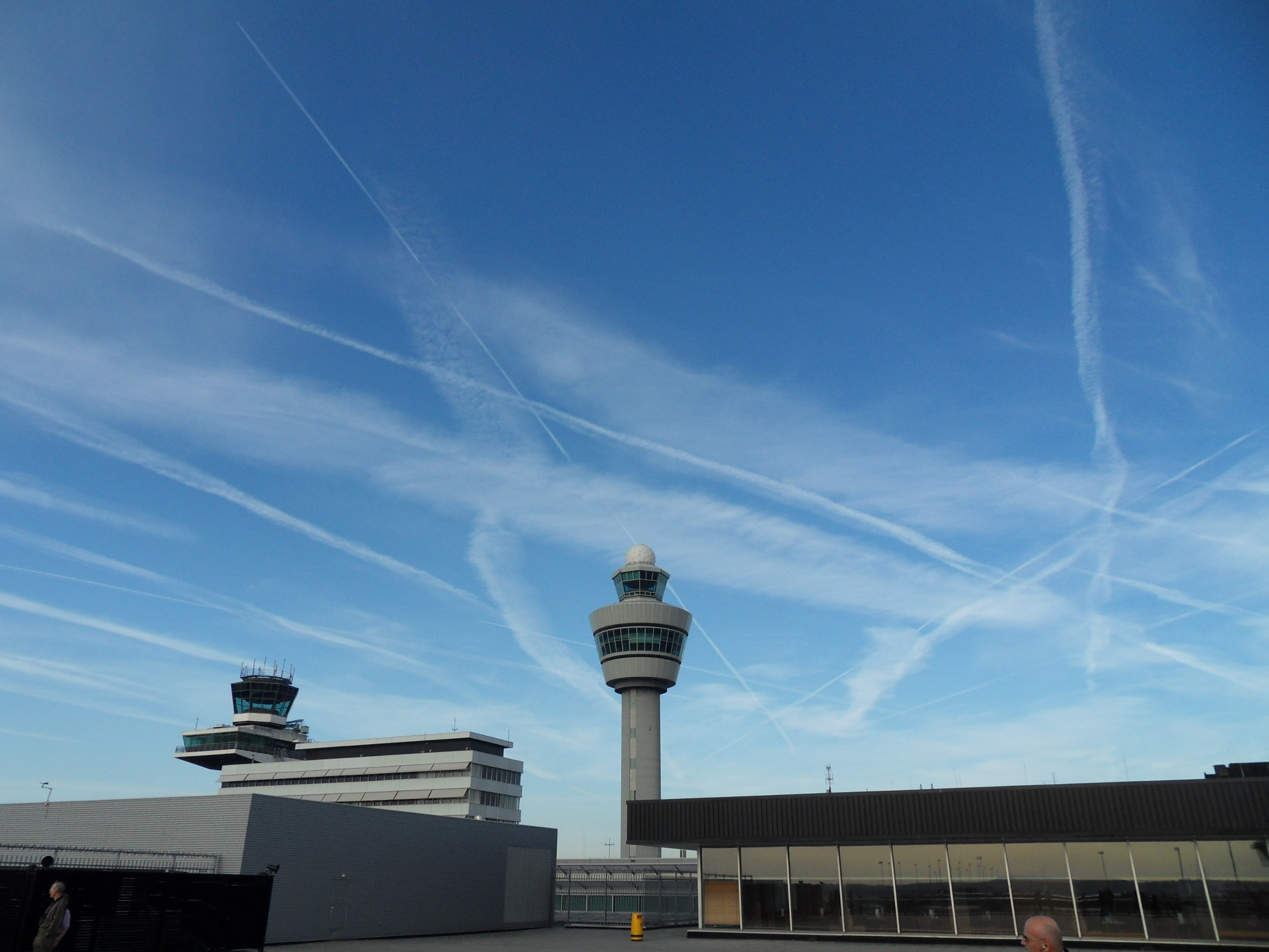 Luchthaven van Schiphol met rooksporen in de lucht.